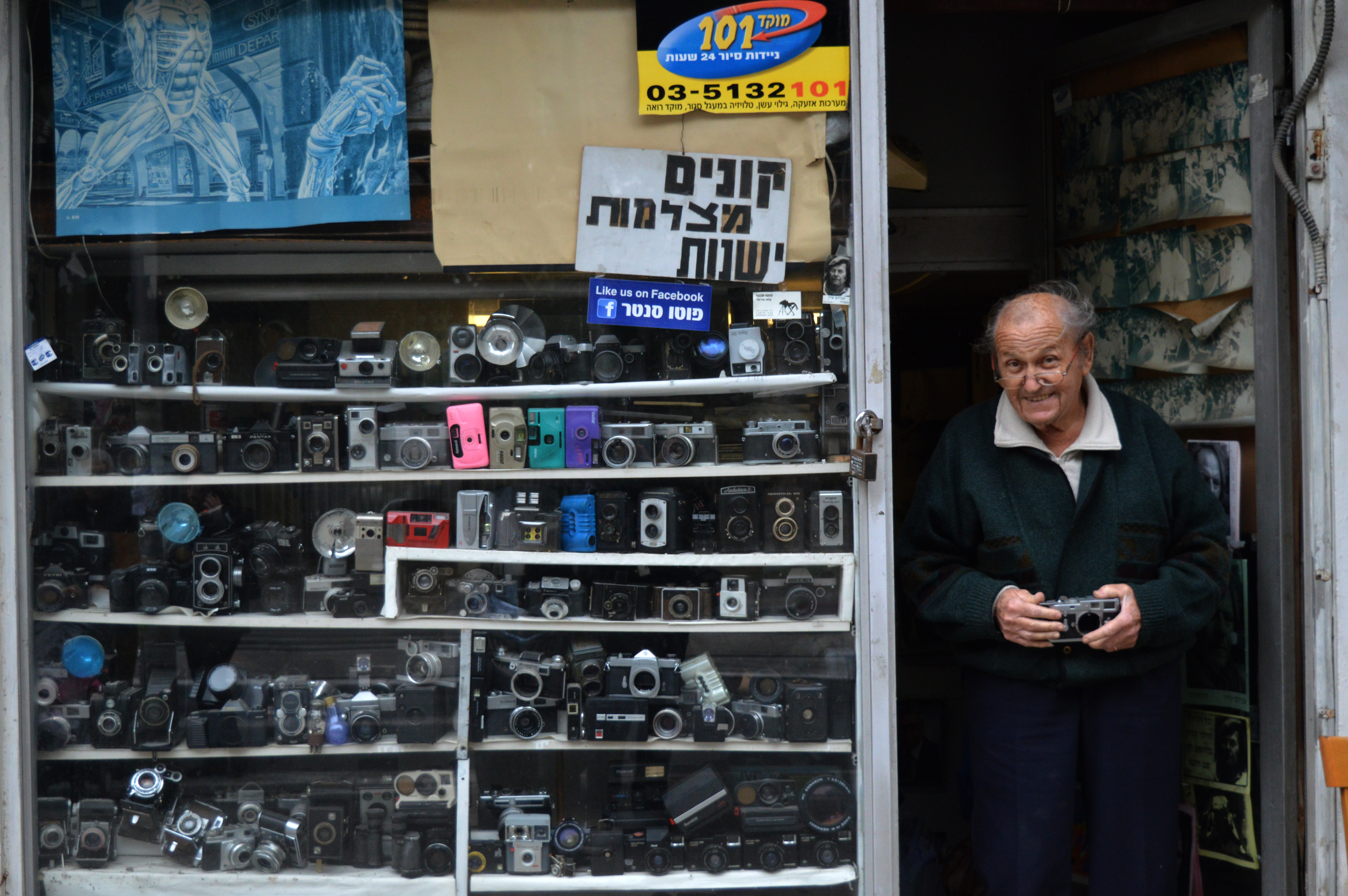 חנות צילום תל אביב